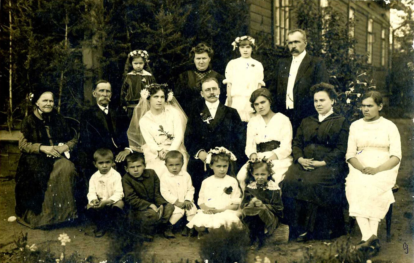 Беларуская (тарашкевіца): Менск. Радзіна Самковічаў у маёнтку Пагулянка (мясьціна Цівалі)